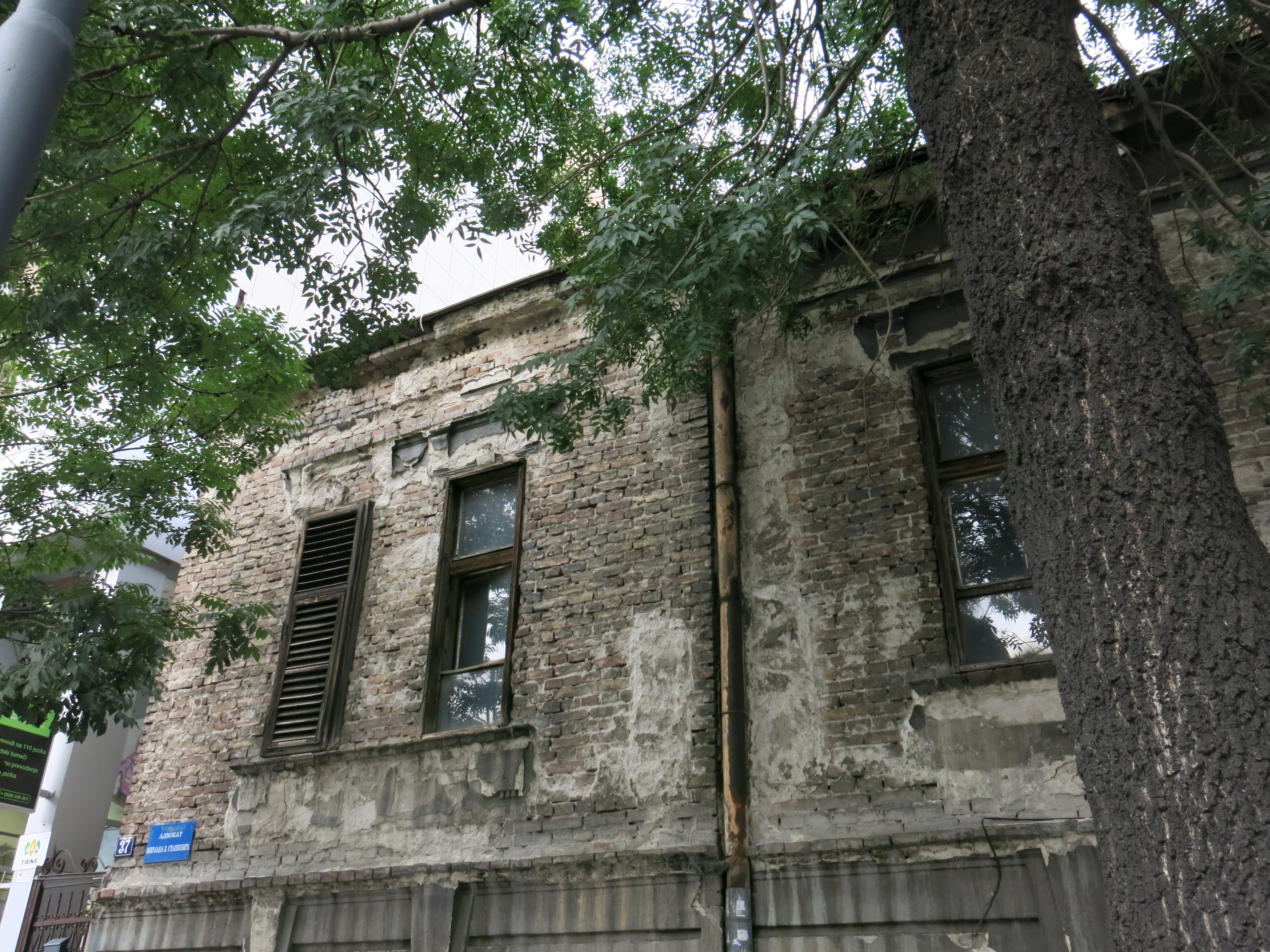 Кућа Филипа Филиповића